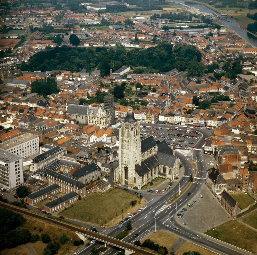 luchtfoto met de Sint-Walburgakerk